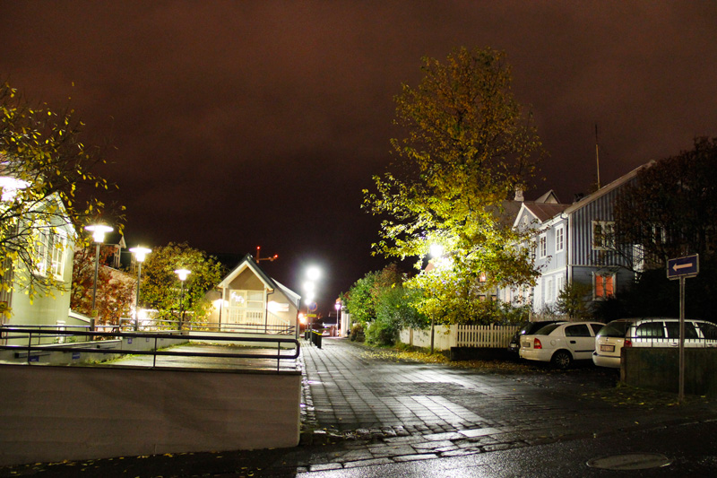 Skólastræti í Reykjavík